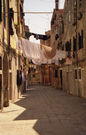 Strada, Venezia, Italia